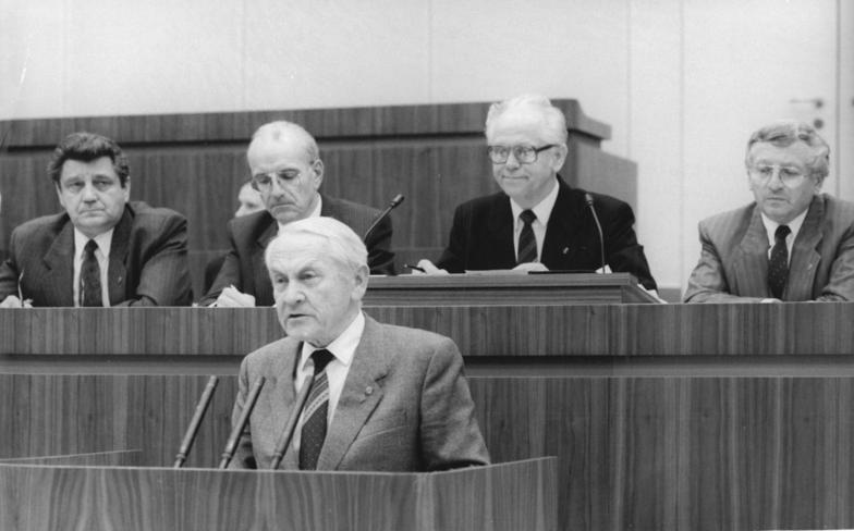 ADN-ZB Mittelstädt 1.12.1989 Berlin: 13. Volkskammer-Tagung Als Tagesordnungspunkt 7 gab der Vorsitzende des zeitweiligen Ausschusses zur Überprüfung von Fällen des Amtsmißbrauchs, der Korruption, der persönlichen Bereicherung und anderer Handlungen, Dr. Heinrich Toeplitz (CDU), einen Bericht zu bisherigen Untersuchungsergebnissen.